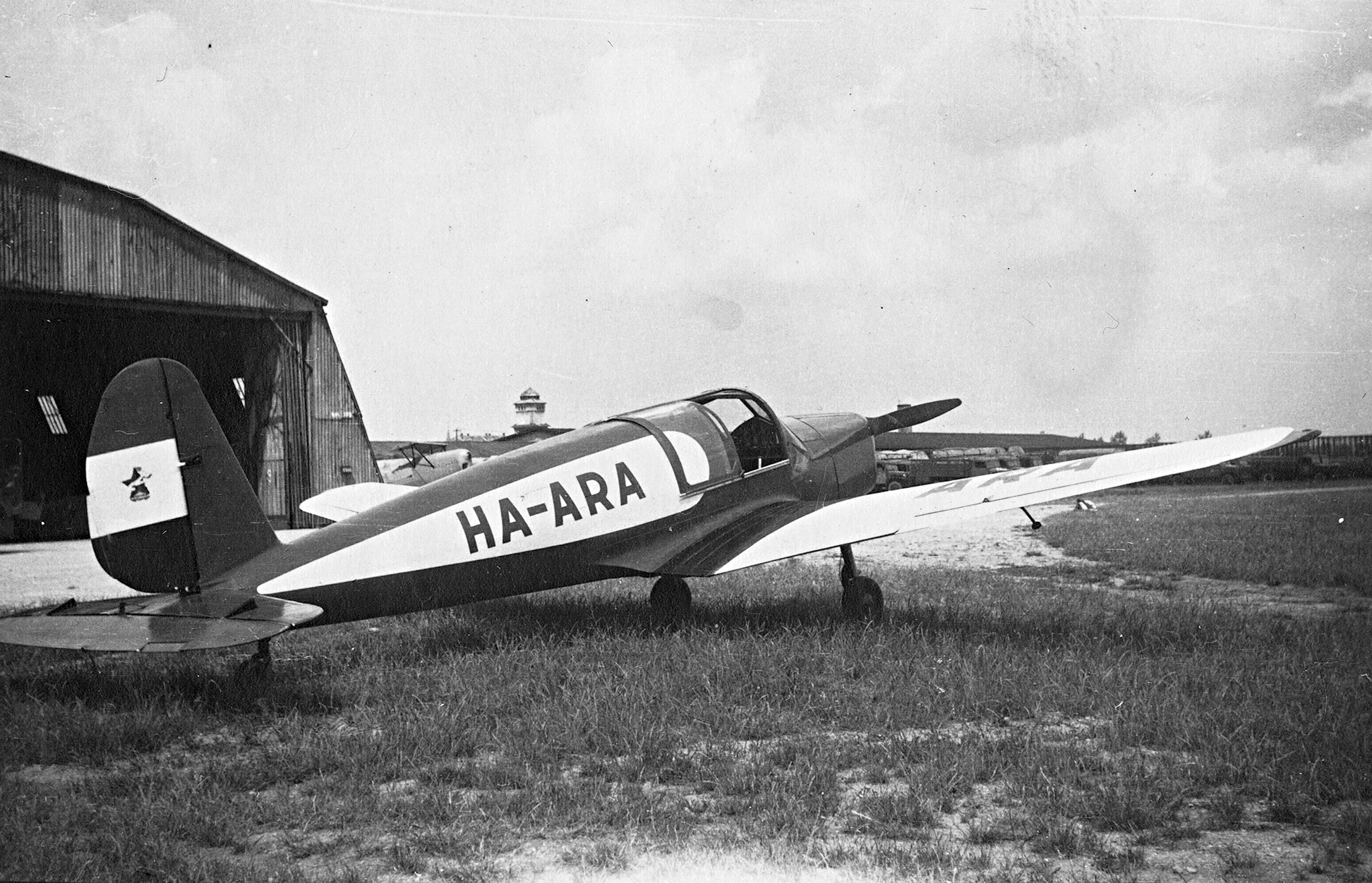 Arado Ar 79 típusú repülőgép. Location: Hungary, Budapest XVI., Mátyásföld Airport Tags: airplane, airport, transport, Arado-brand, Gerrman brand, Budapest Title: Arado Ar 79 típusú repülőgép.